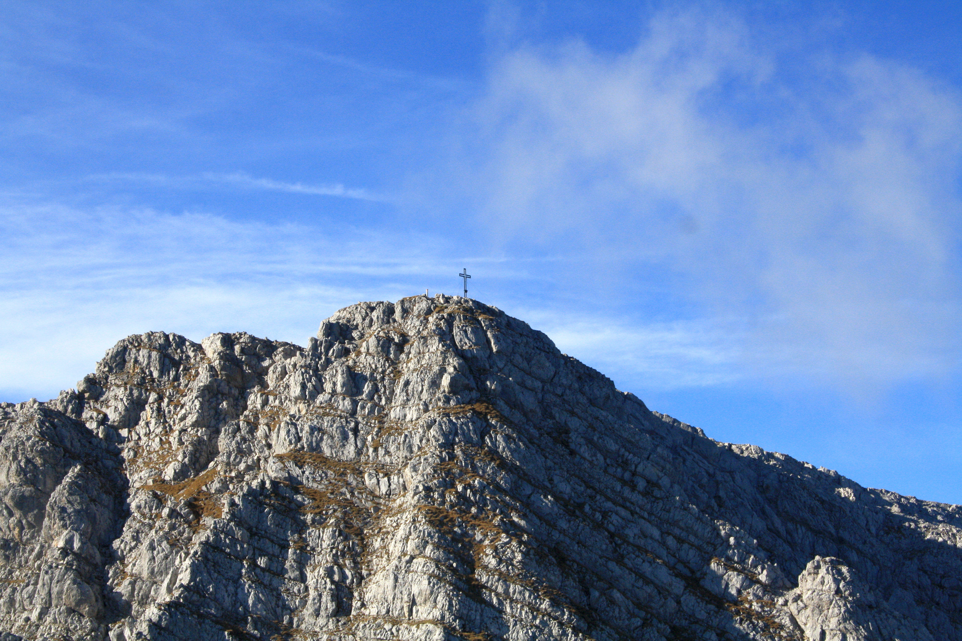 Grimminggipfel, Luftbild 2012